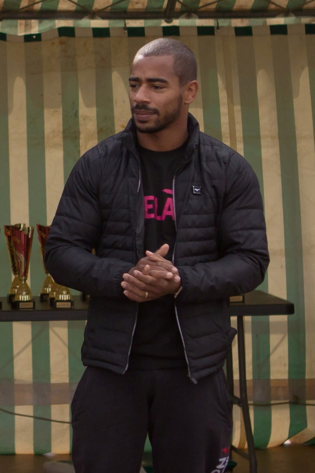 Davis Larose à Villabé lors de la « Foulée des Brettes 2017 », qui a eu lieu le 17 septembre 2017 à Villabé (Essonne, France) au profit de l'association ELA